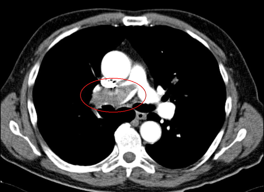 Befund: Nachweis einer Lungenembolie mit Verlegung der rechten Pulmonalarterie. Gut sichtbar ist die Kontrastmittelaussparung im markierten Gefäß. Das Gefäß müsste strahlend weiß sein. Technik: Thorax-CT mit einem 64-Zeiler (Somatom Sensation von Siemens) unter i.V. Kontrastmittelgabe und Bolustriggerung in der Pulmonalarterie